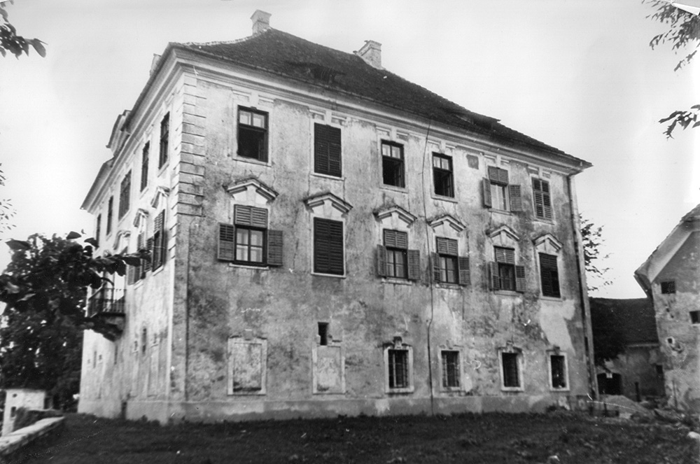 Grad Zaprice